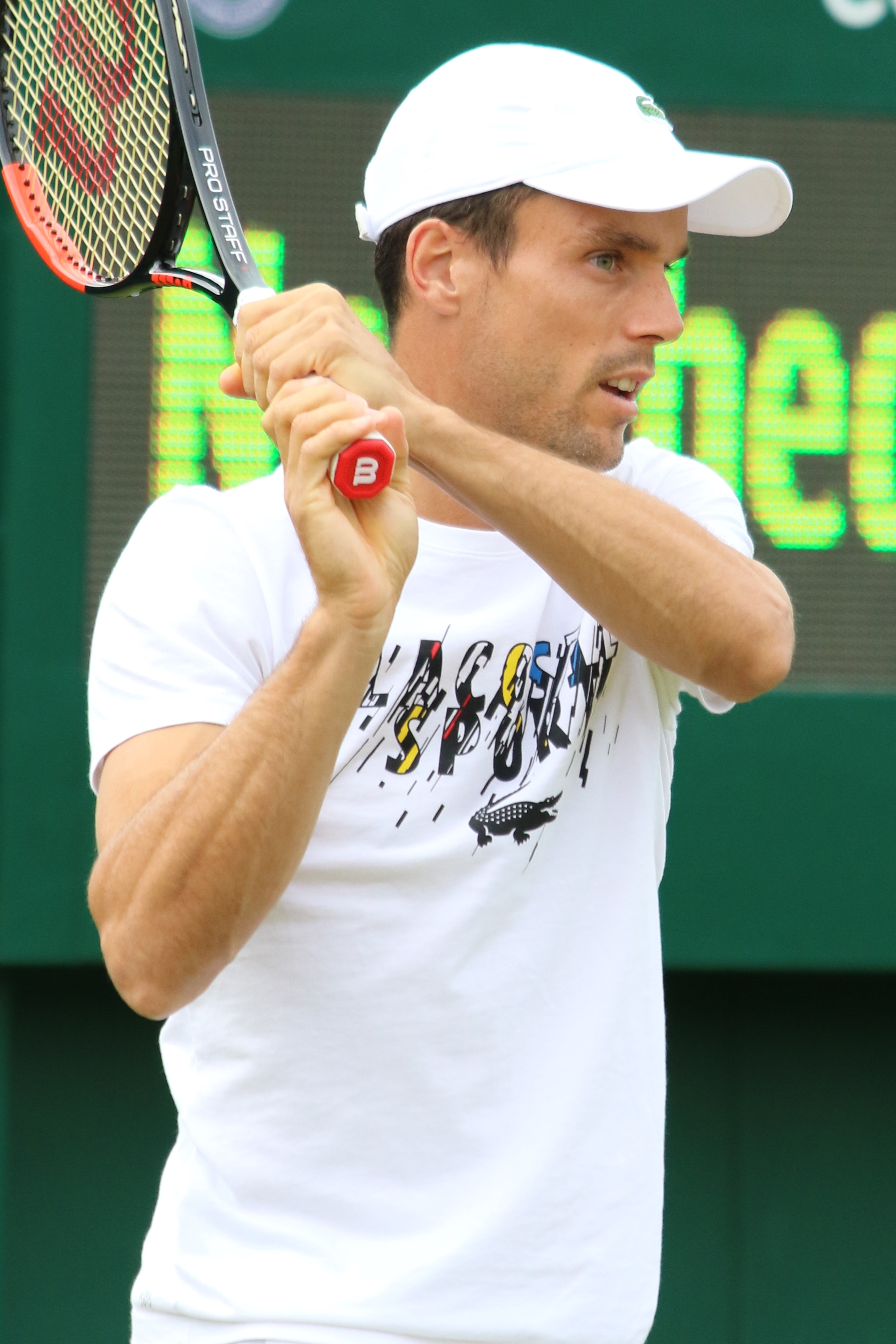 Bautista Agut WM17 (3)